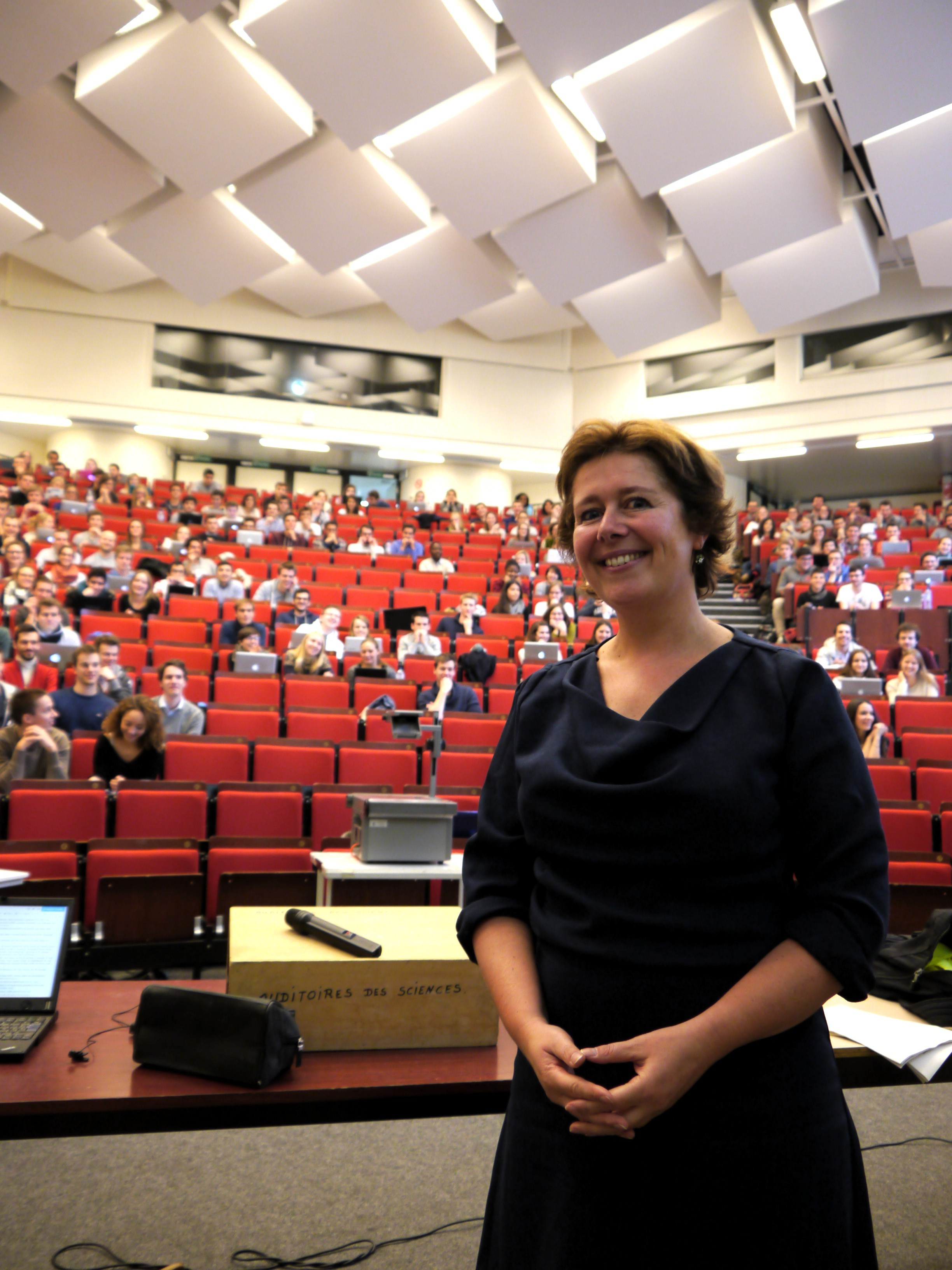 Photo de Eva Brems lors du cours d'éthique économique et sociale de Philippe Van Parijs à UCLouvain.